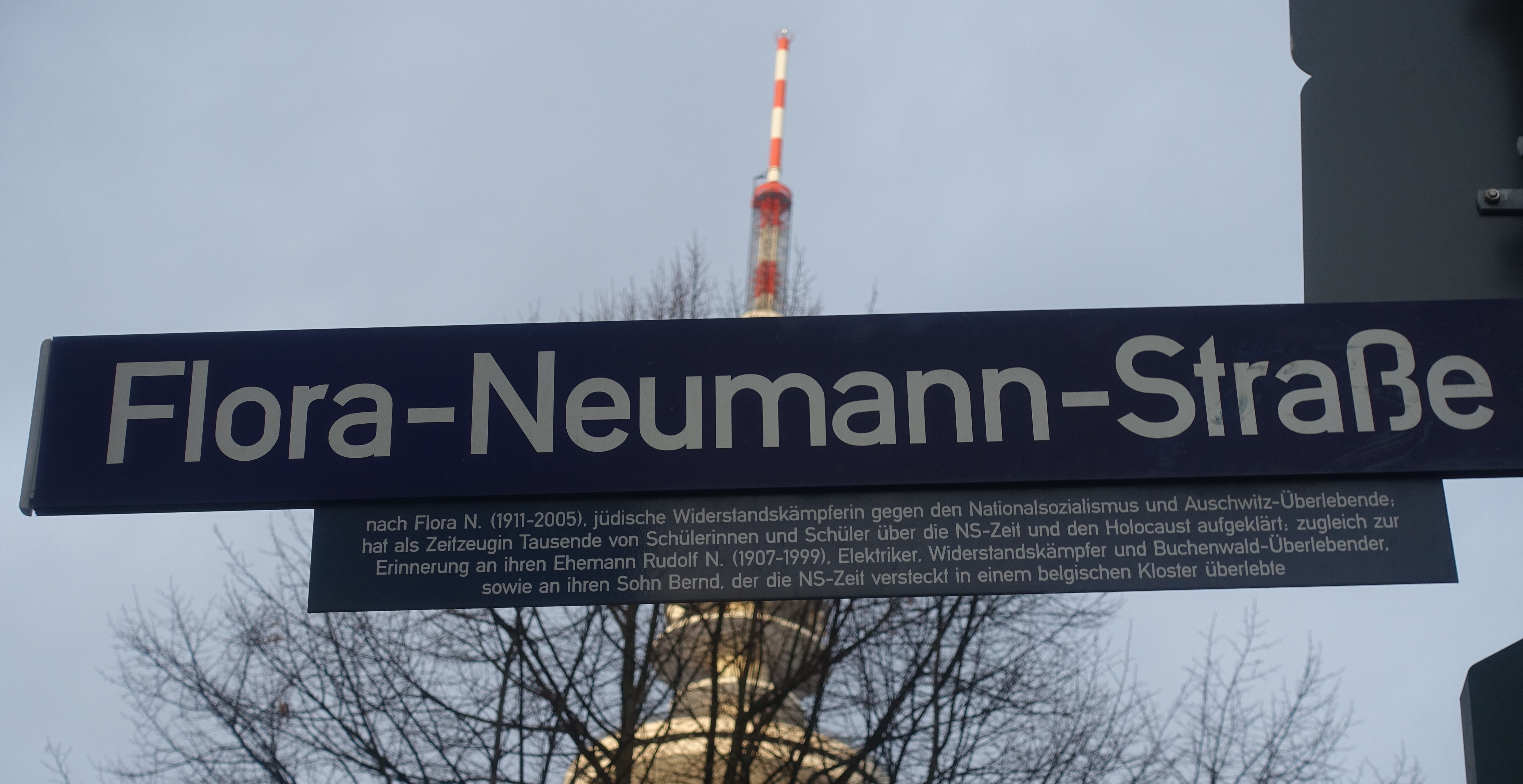 Straßenschild Flora-Neumann-Straße zur Würdigung der Widerstandskämpferin Flora Neumann und ihres Mannes